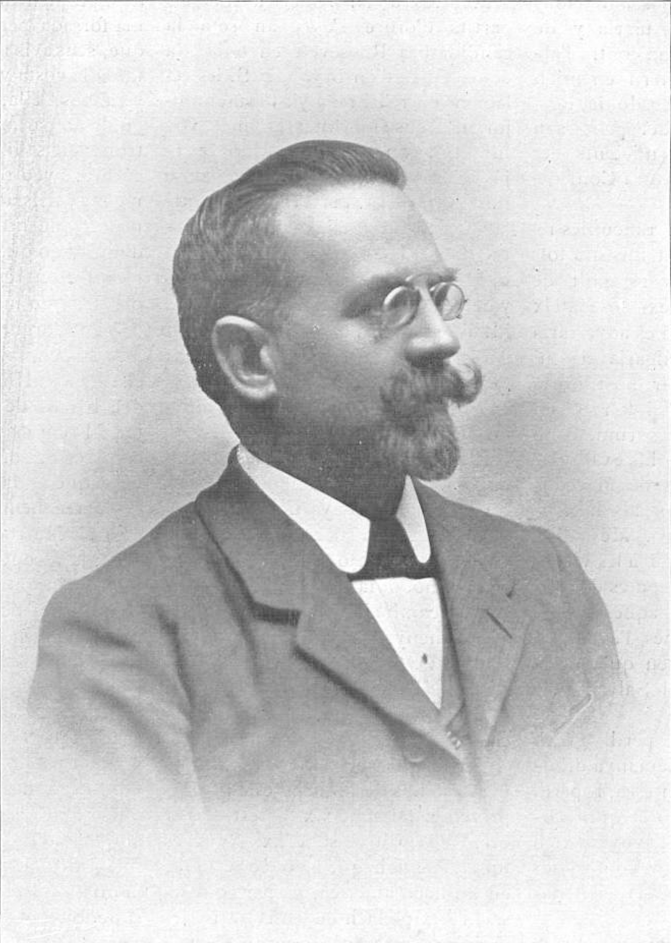 Antoni Rubió y Lluch.